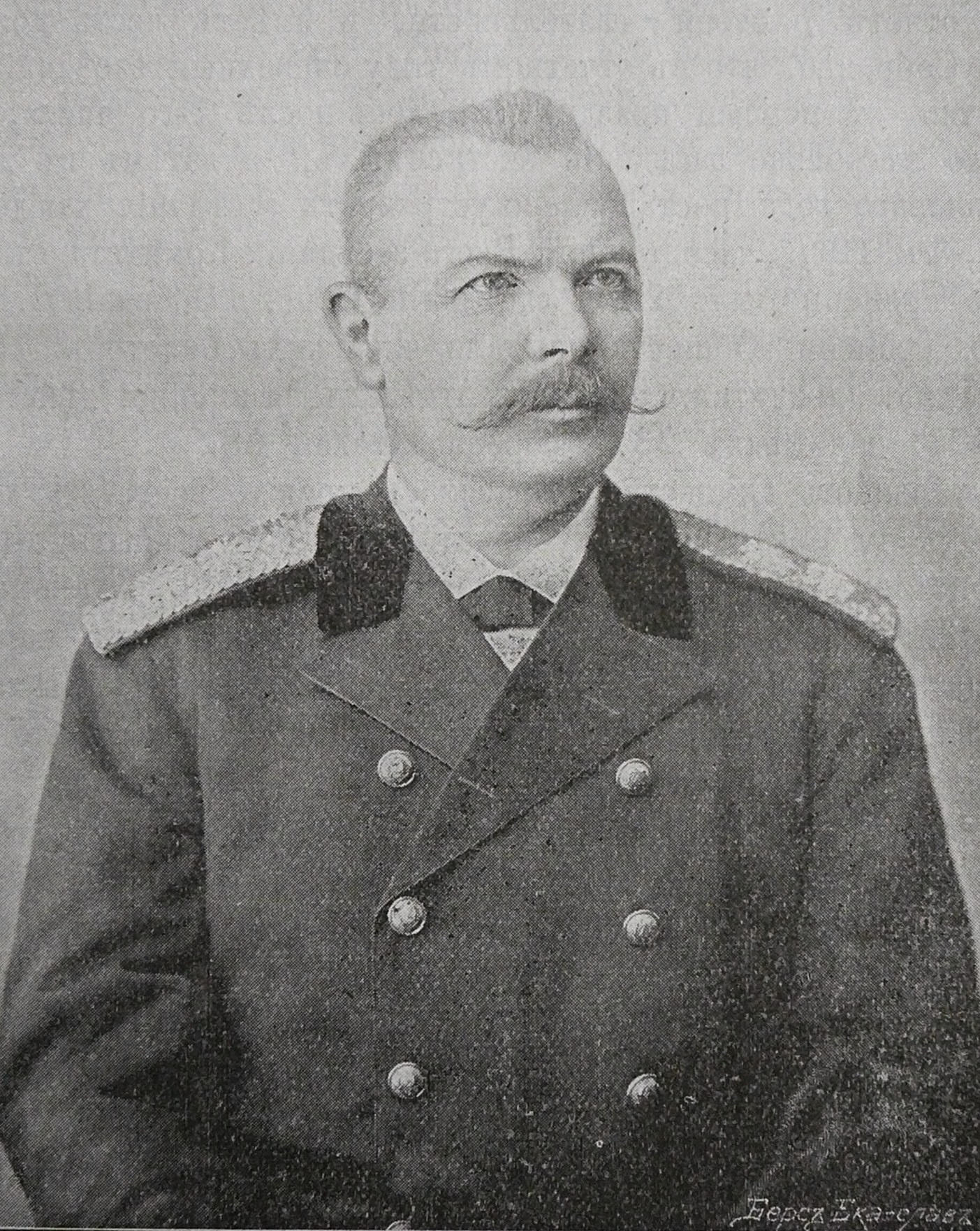 Самарский губернатор (в 1891 - 1904 гг.), почётный член "Казанского Общества Трезвости" Александр Семёнович Брянчанинов (1843 - 1910).